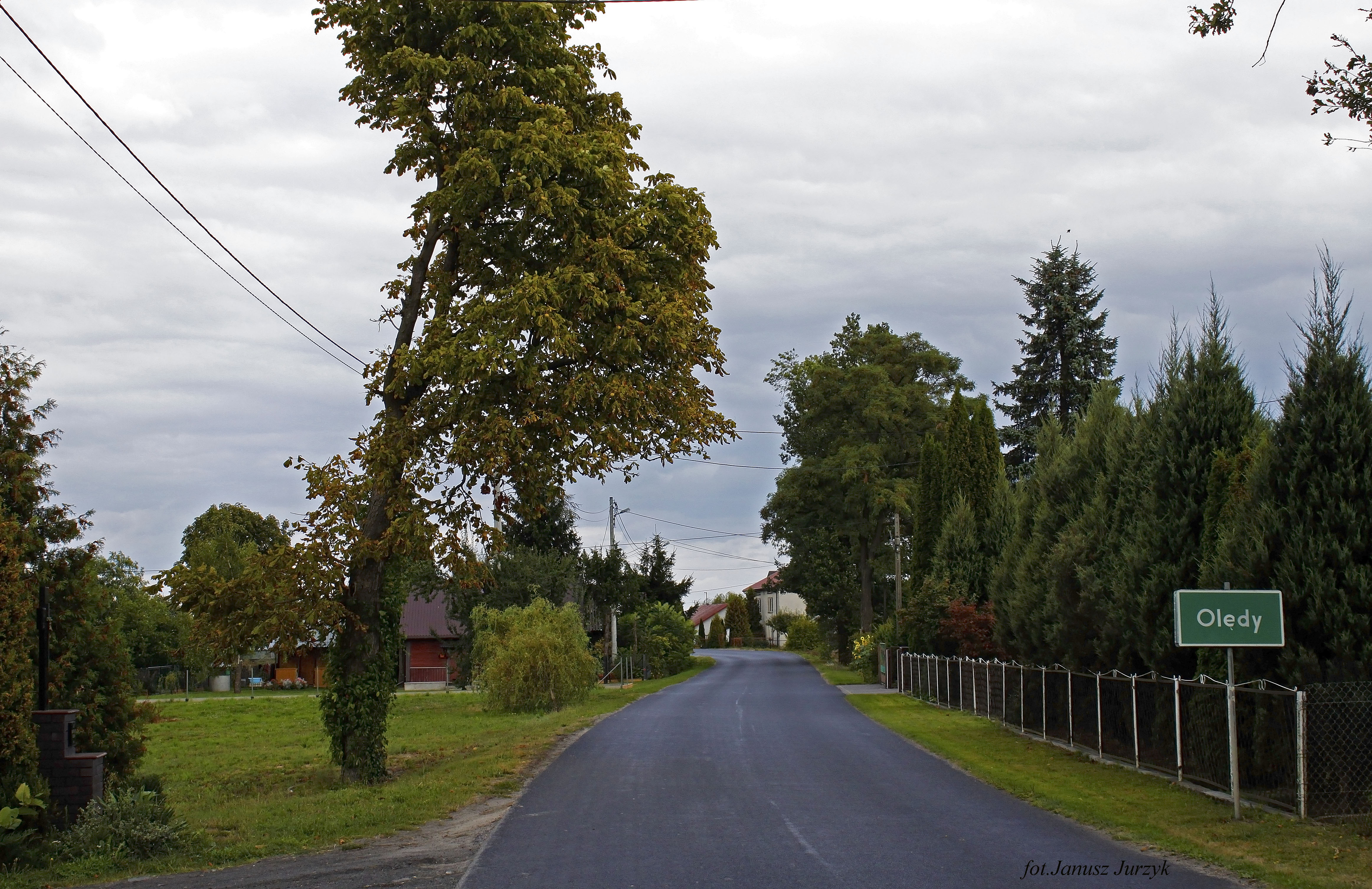 Olędy